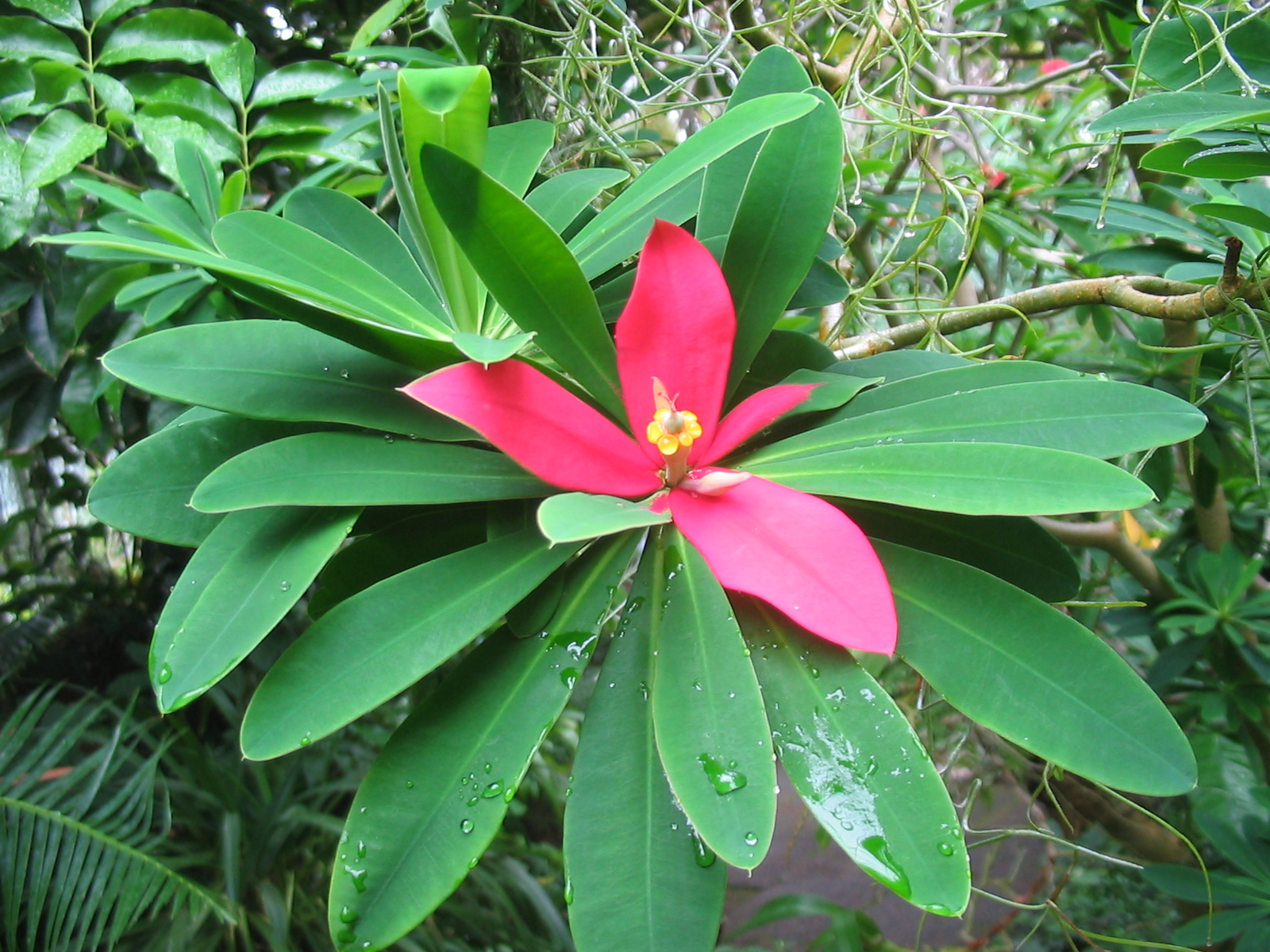 Euphorbia punicea - Blüte - Bot. Garten Edinburgh